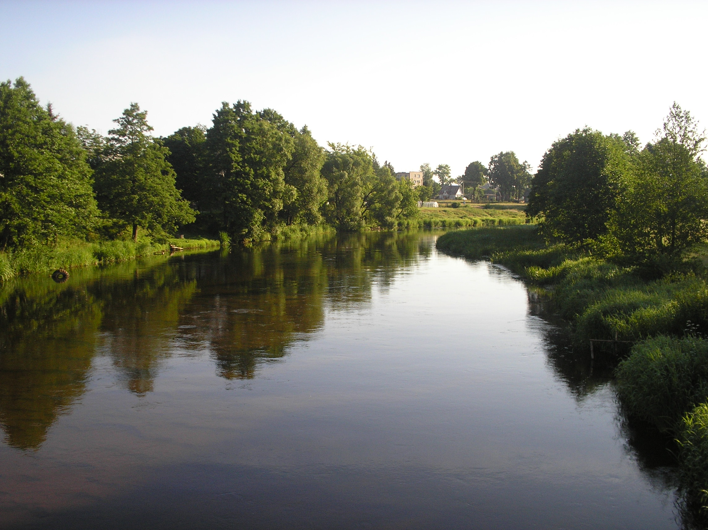 Река Жеймяна